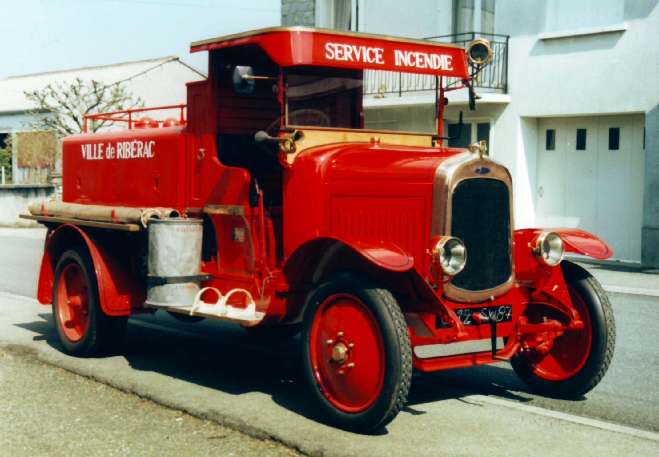 Véhicule de lutte contre l'incendie de marque LAFFLY, modèle LV de 1923 Collection Vignéras de Châlus